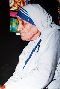 Description